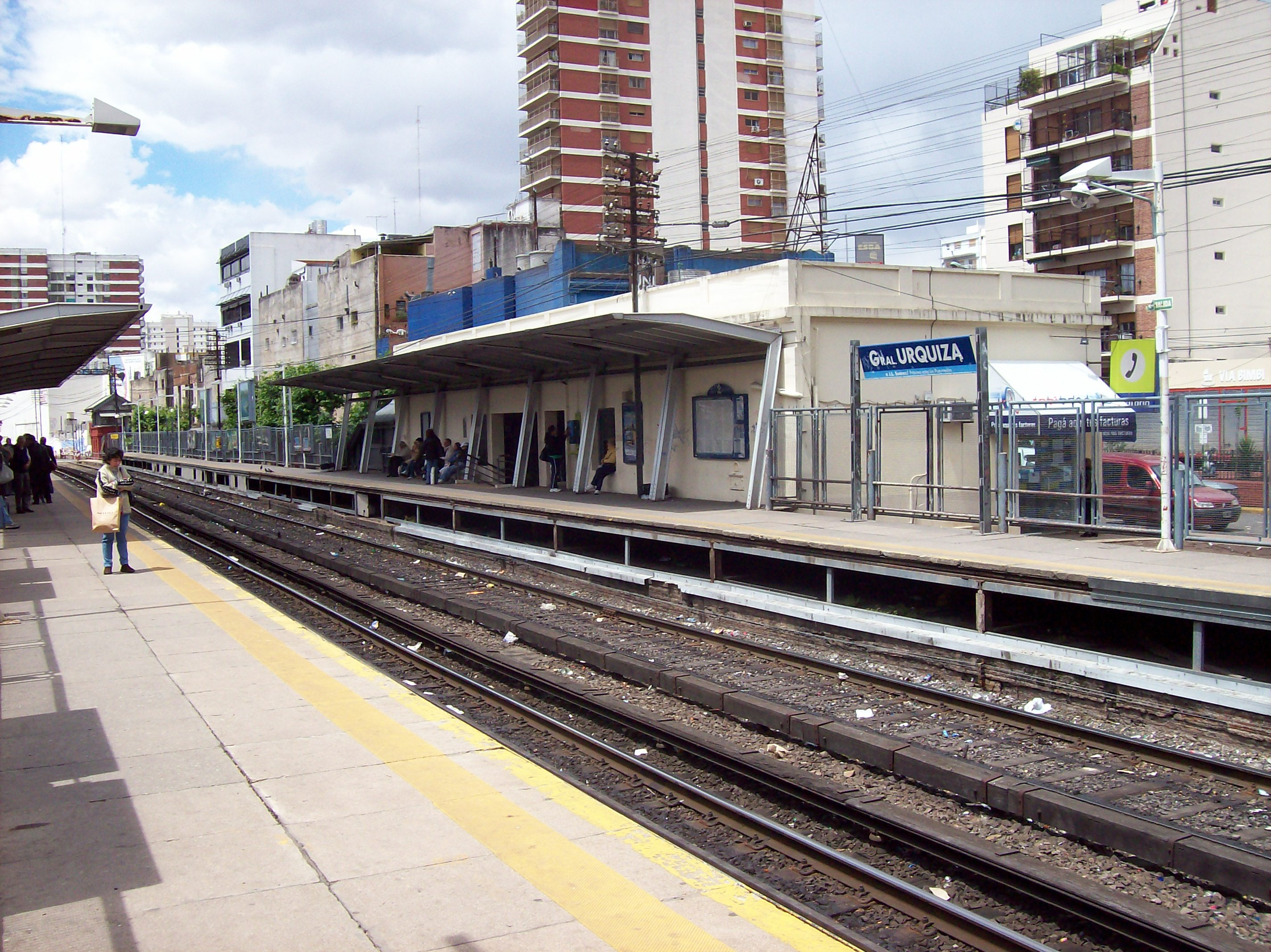 Estación General Urquiza de la línea Bartolomé Mitre, Ramal Retiro-Suárez. La foto fue tomada de SO a NE, desde el andén Noroeste (cerca de Bucarelli y Roosvelt)